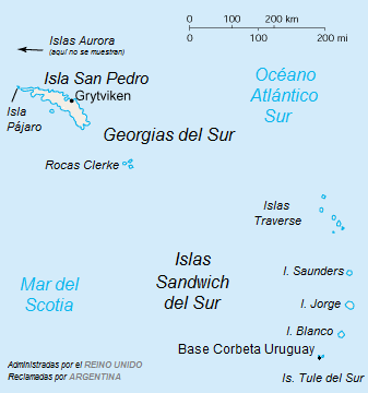 Versión en español del mapa de las islas Georgias del Sur y Sandwich del Sur